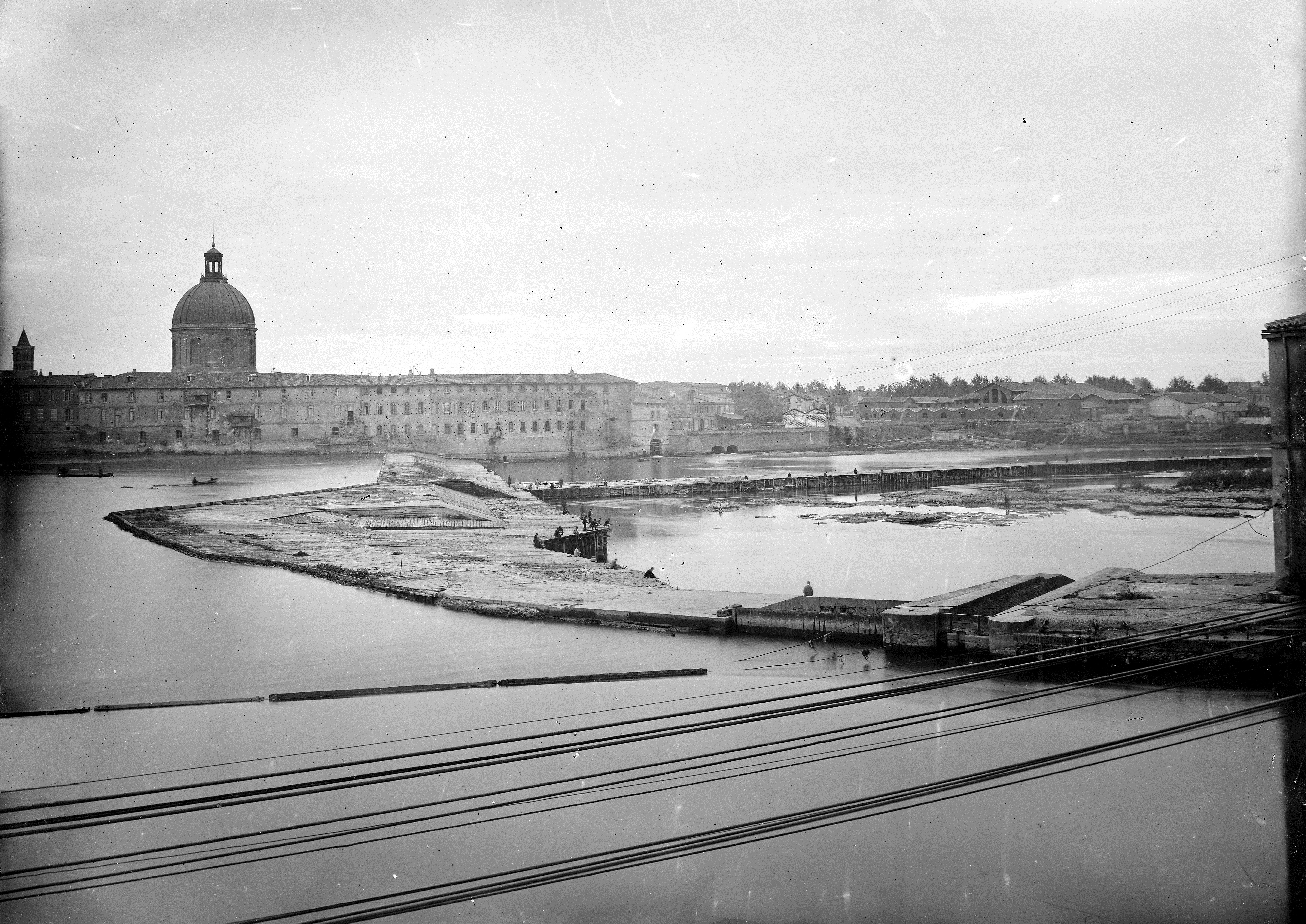 plaque négative au gélatino-bromure d'argent, format 18x24 cm. Sans inscription ni mention d'auteur.